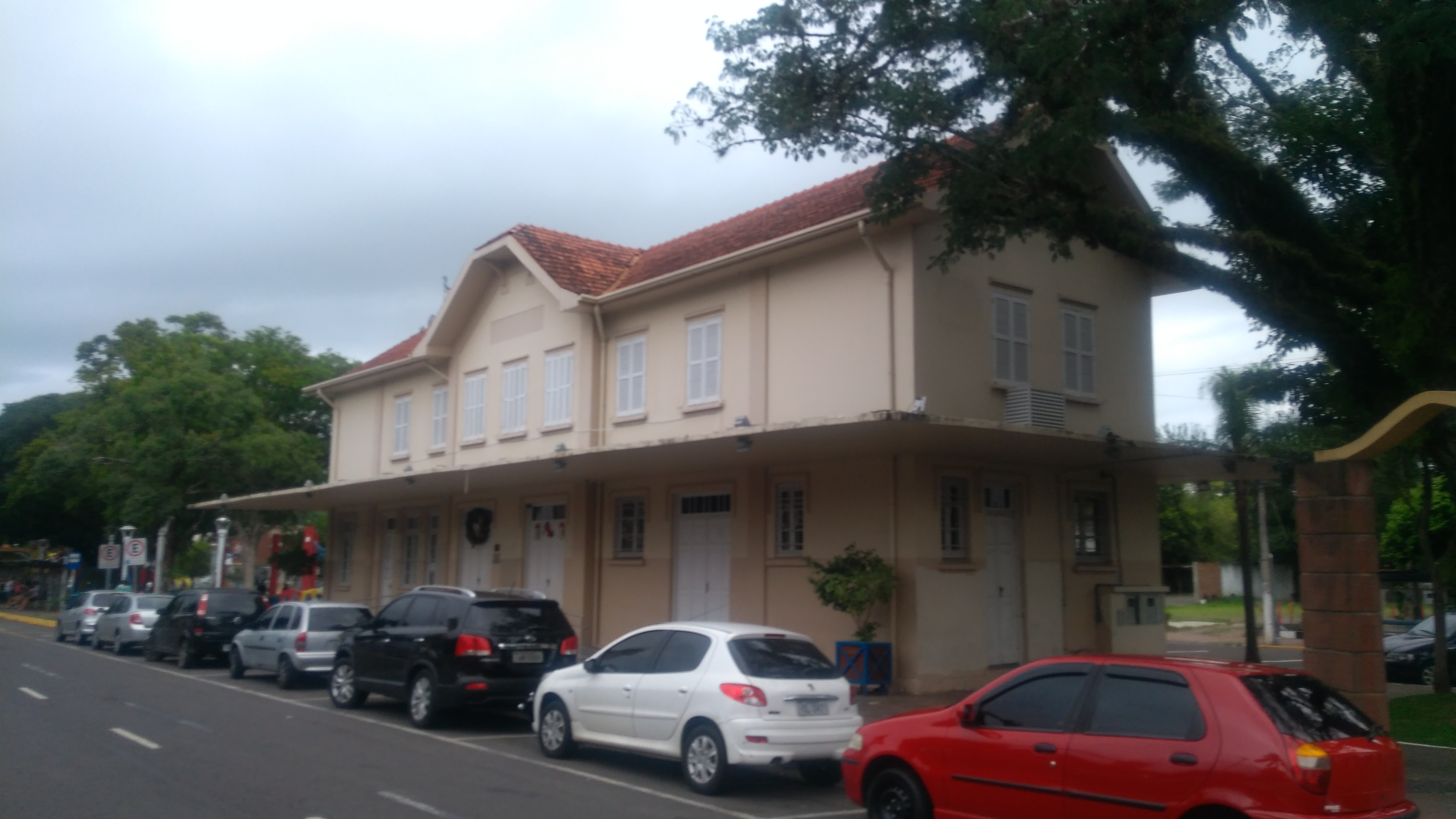 Antiga Estação Ferroviária de Campo Bom (Brasil)